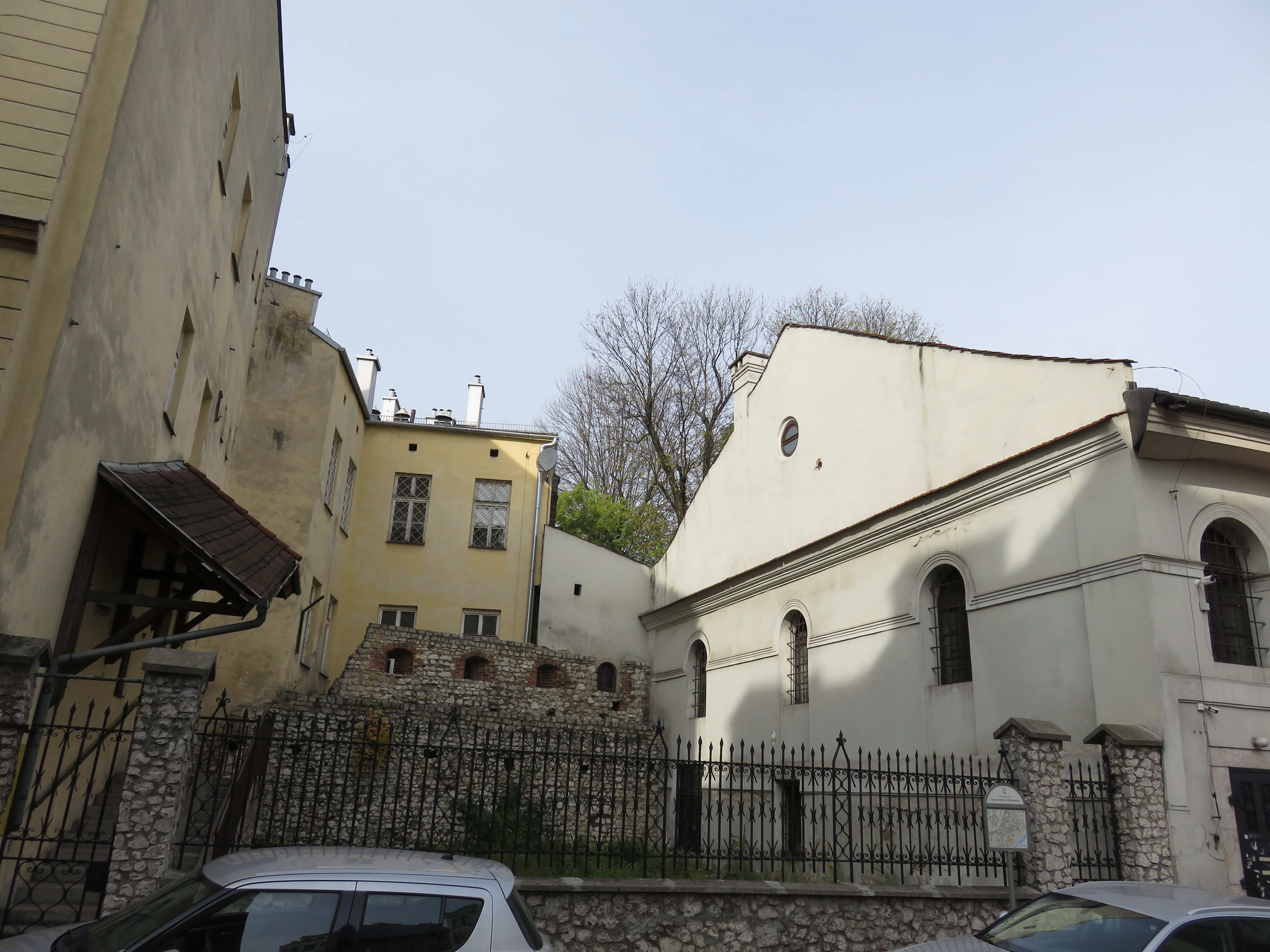 שריד מהחומה העתיקה של קז'ימייז', קרקוב.jpg